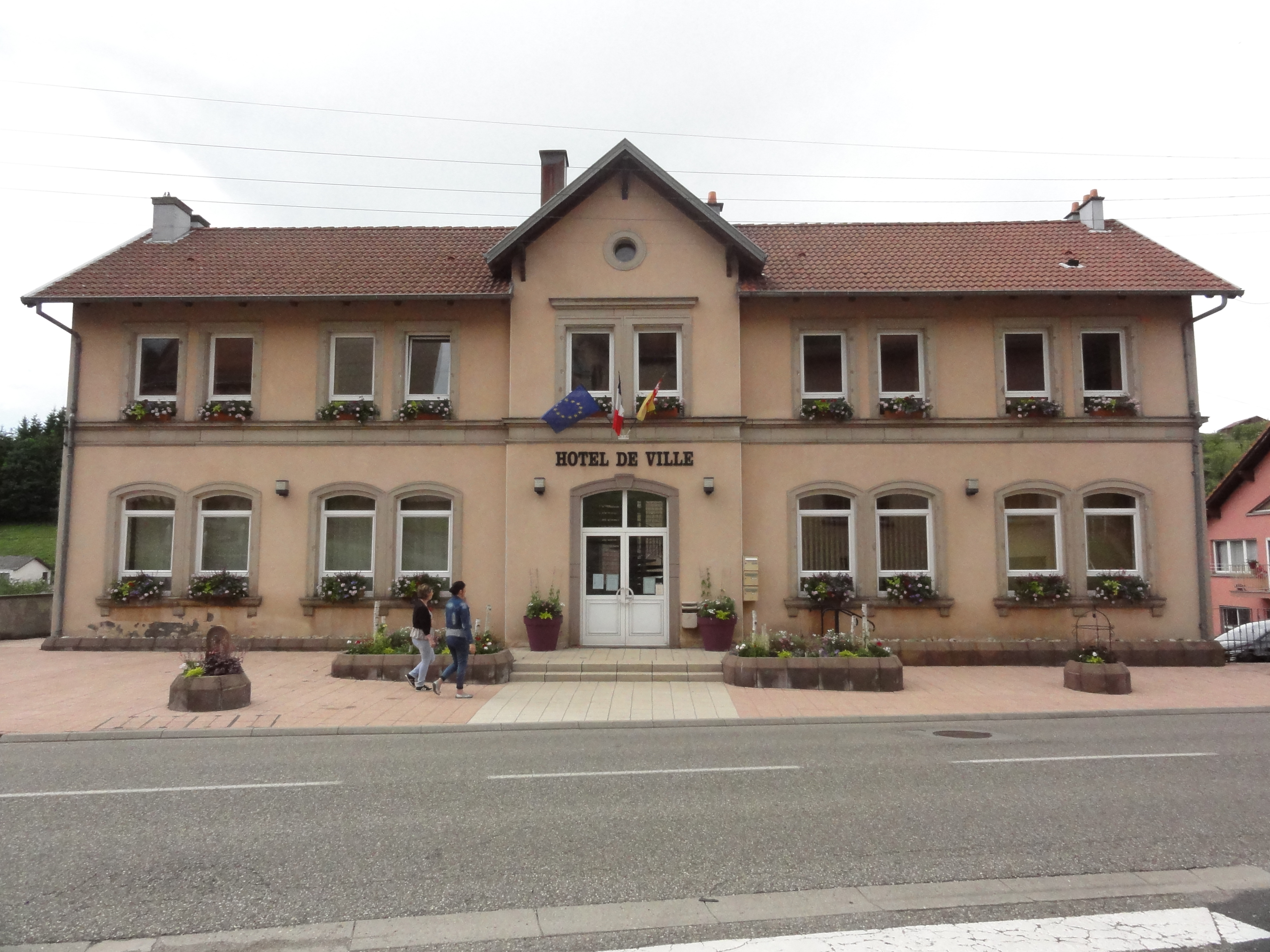 Troisfontaines (Moselle) mairie